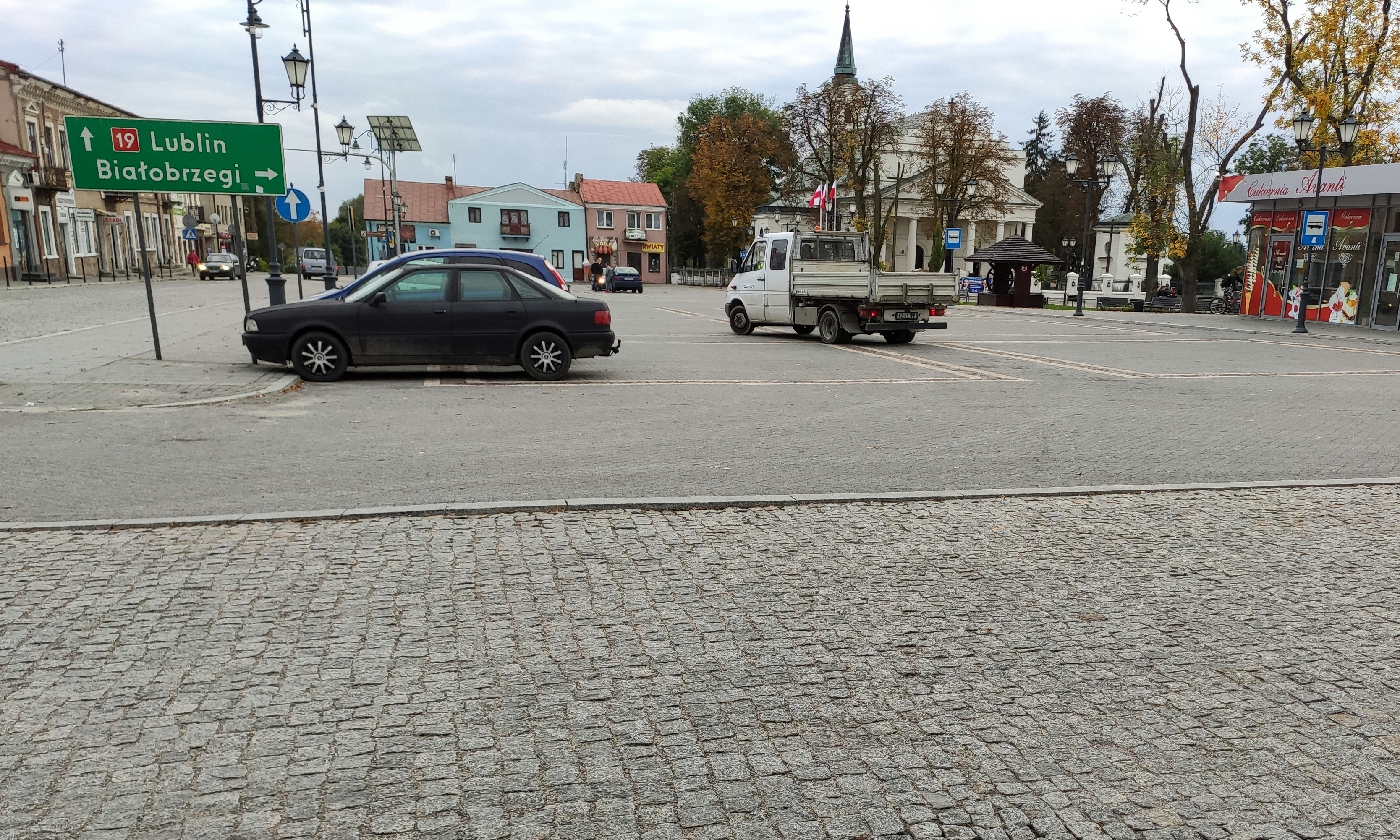 Rynek w Kocku po rewitalizacji w 2013r.